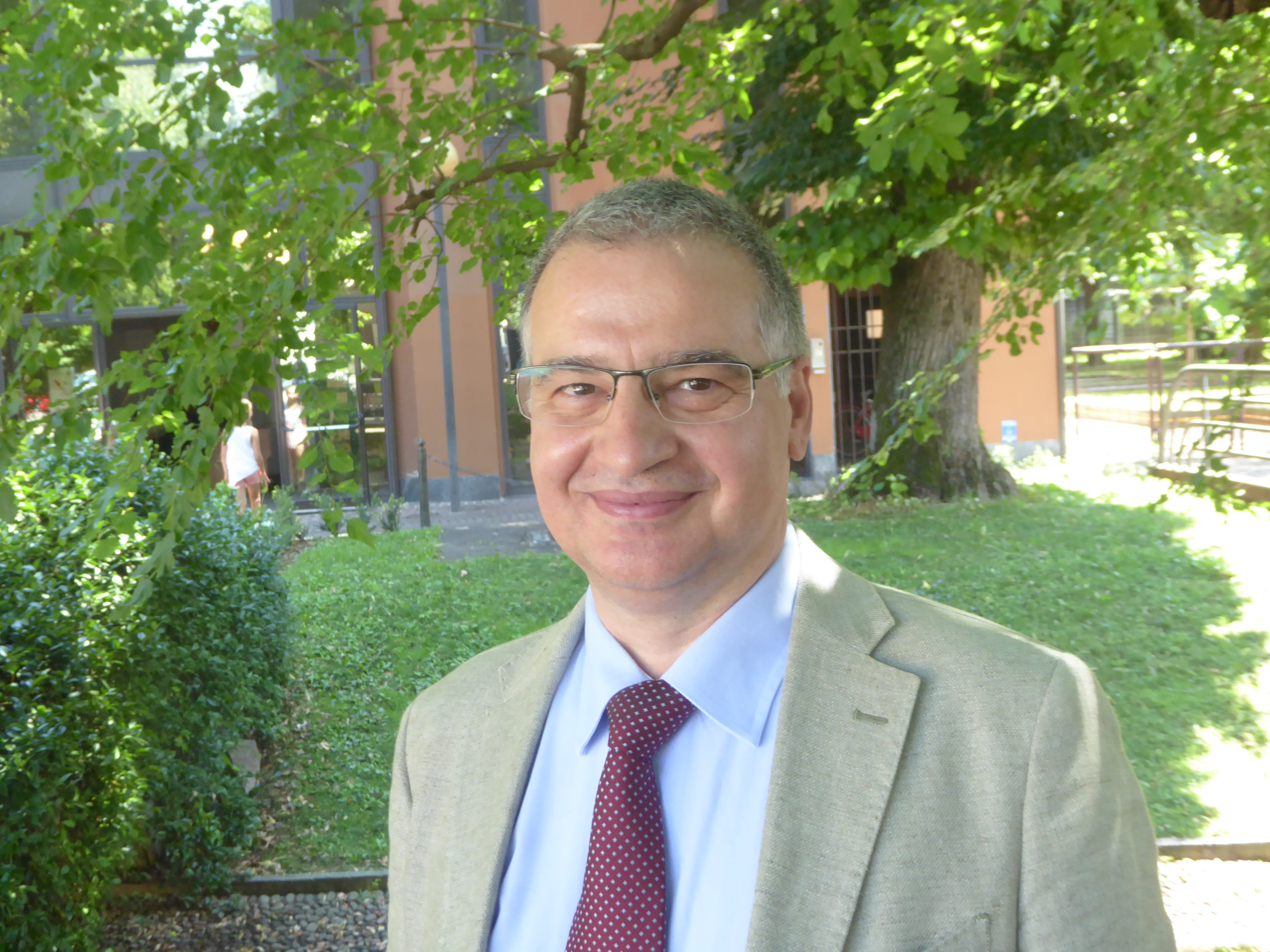 Renato Meregalli, sindaco di Vedano al Lambro, nel cortile del municipio dopo un atto ufficiale.